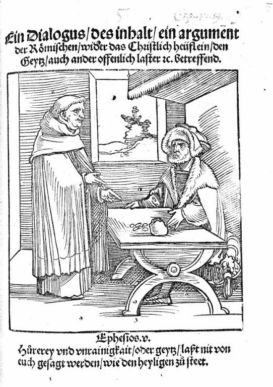 Titelbild zu Hans Sachs' "Ein Dialogus des inhalt ein argument der Römischen wider das Christlich heuflein, den Geytz auch ander offenlich laster etc. betreffend" aus dem Jahre 1524